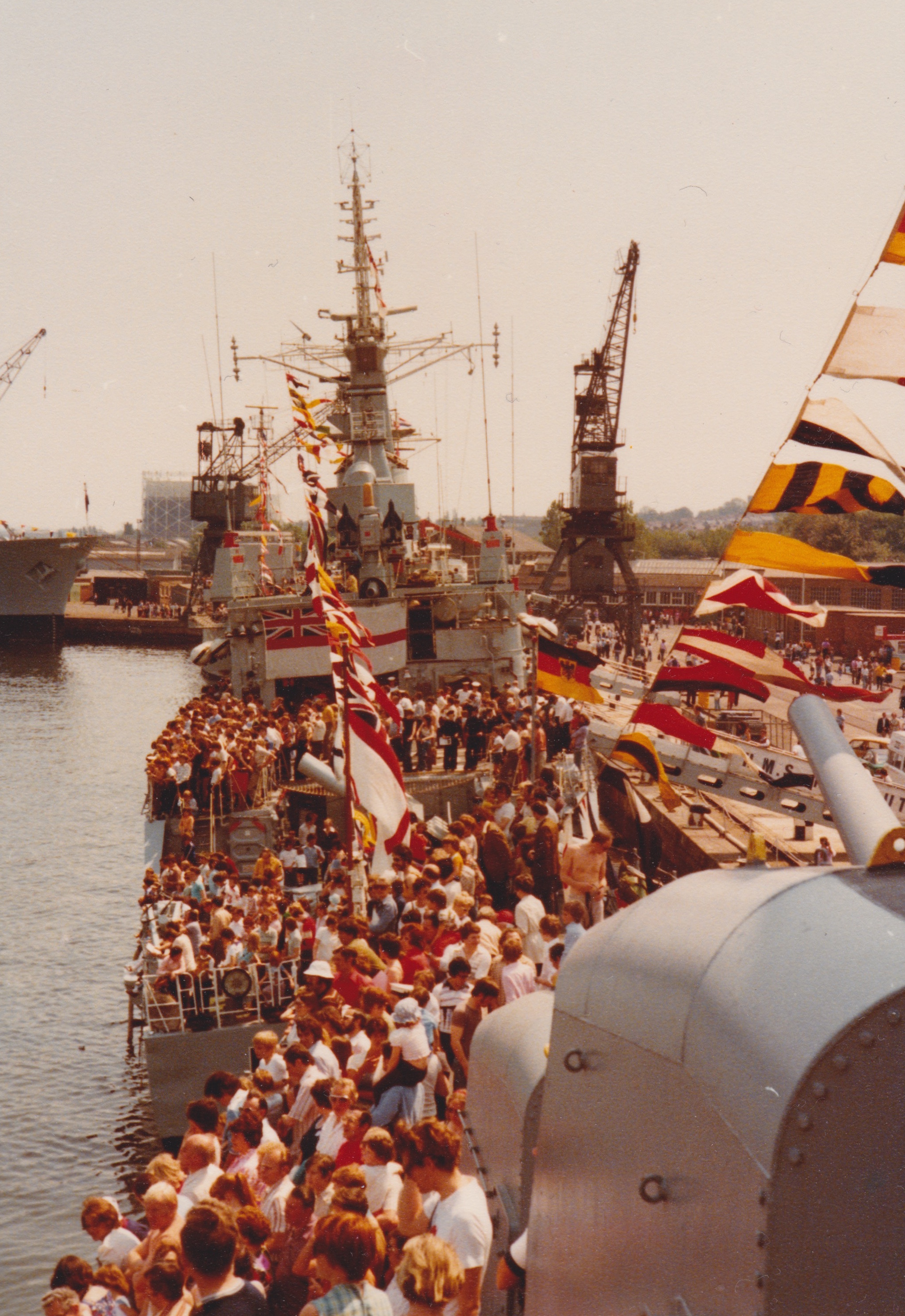 Open day, ?1977